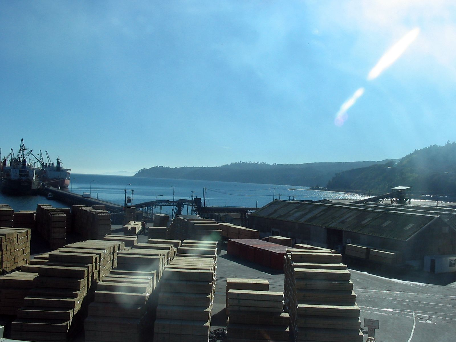 Puerto Lirquen (Chile)